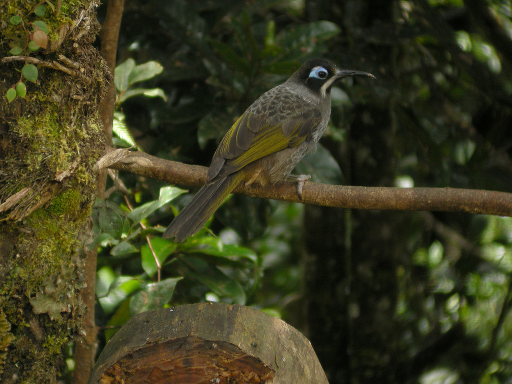 Belford's Melidectes (Melidectes belfordi)